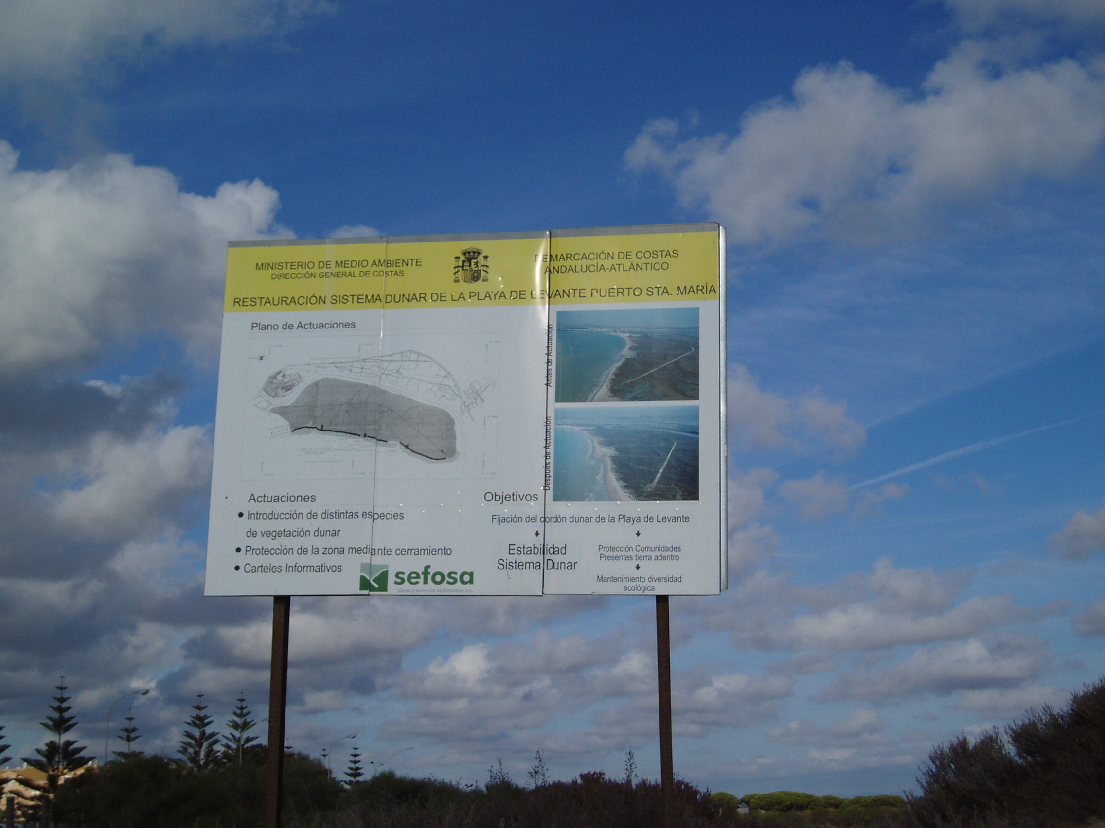 Cartel situado entre las playas de Valdelagrana y Levante, en El Puerto de Santa María, España.